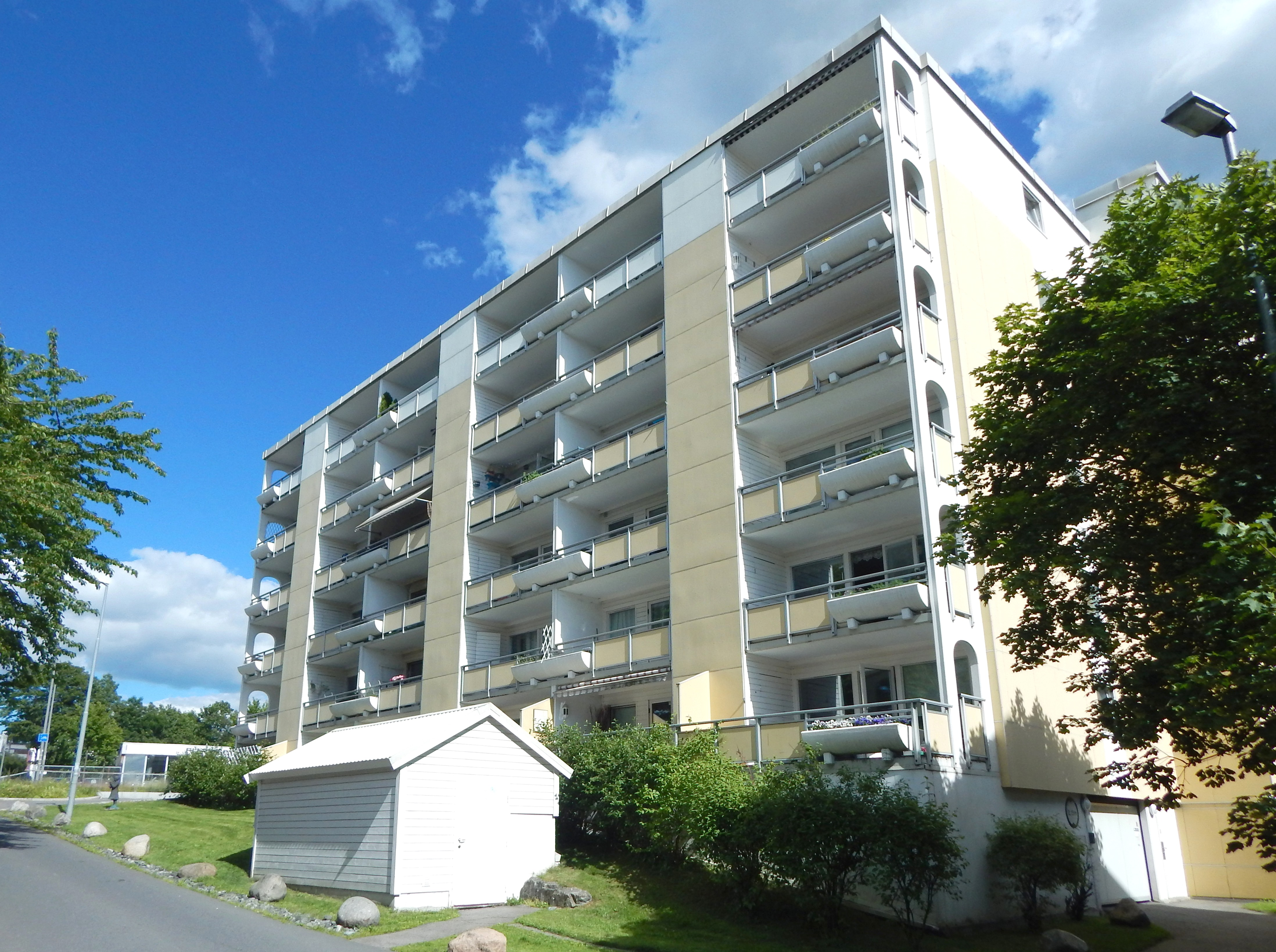 Ensjøsvingen